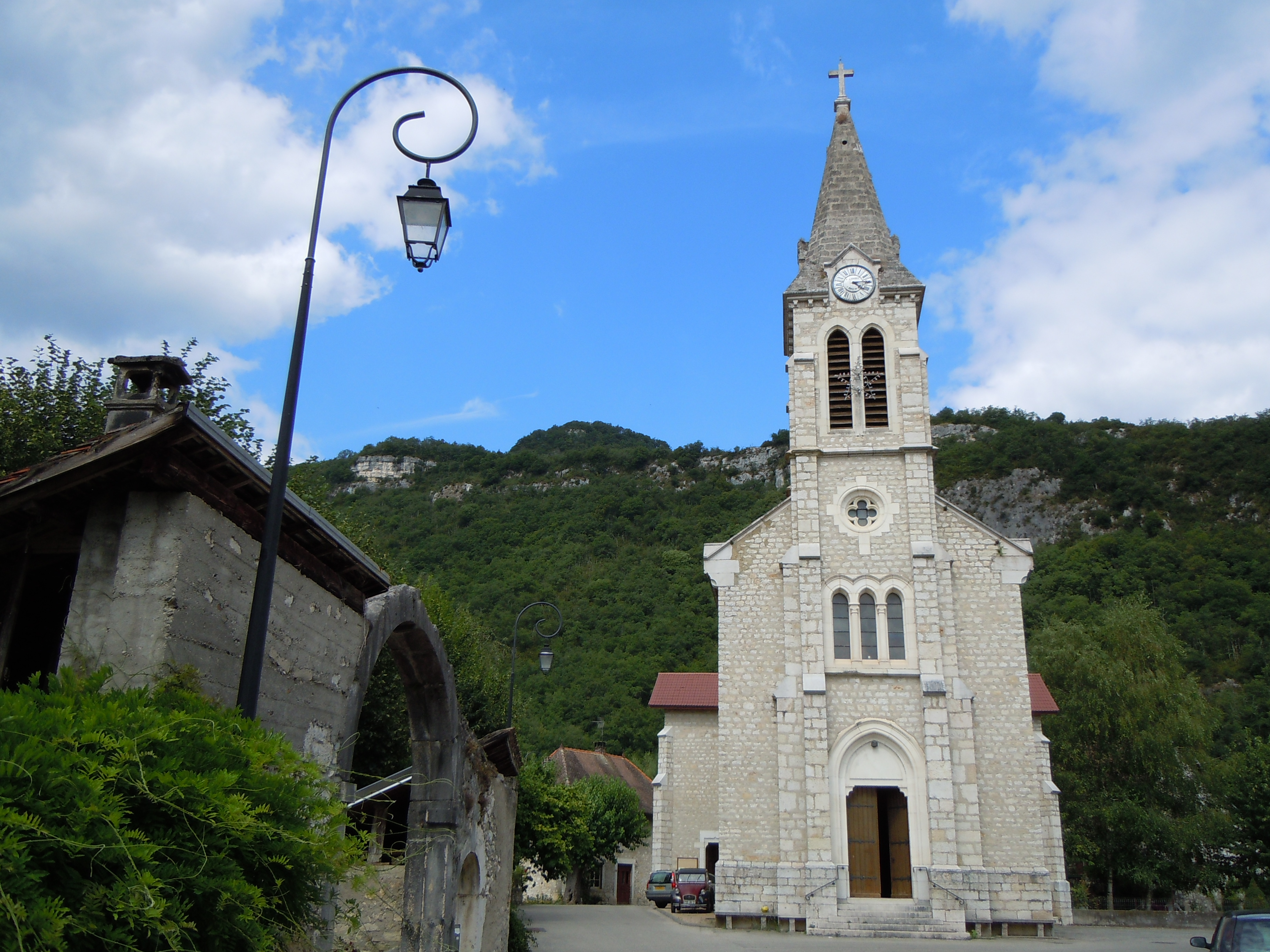 Brégnier-Cordon - Église de Brégnier-Cordon - Ain (département) - France